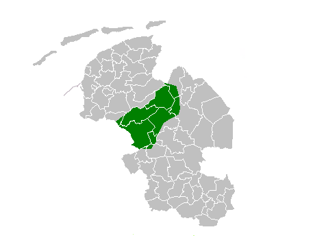 Made by nds-Gebruker:Grönneger 1